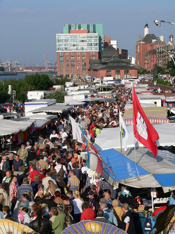 Hamburger Fischmarkt am Sonntagmorgen mit alter Fischauktionshalle